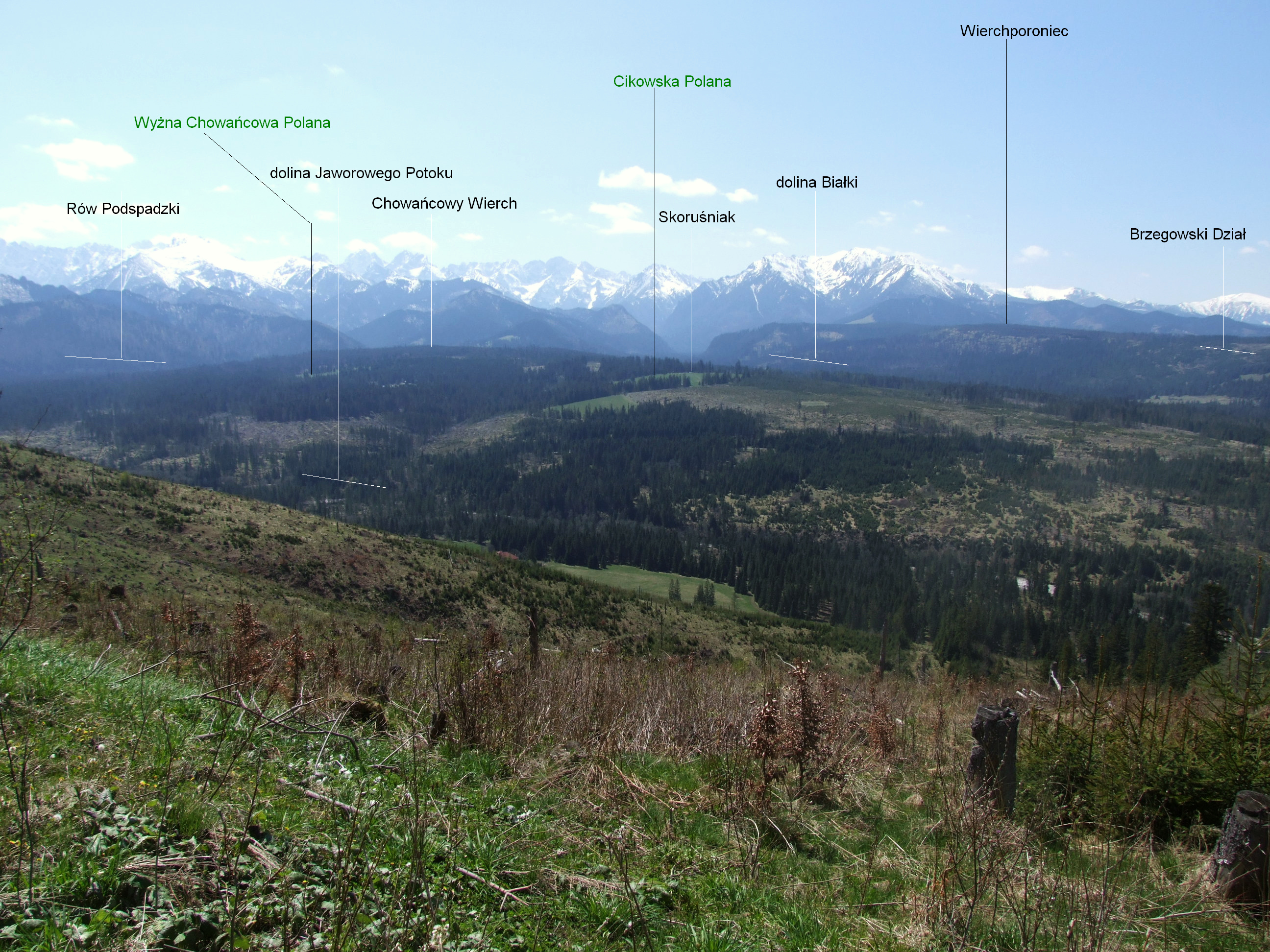 Widok z Magury Spiskiej nad Jurgowem